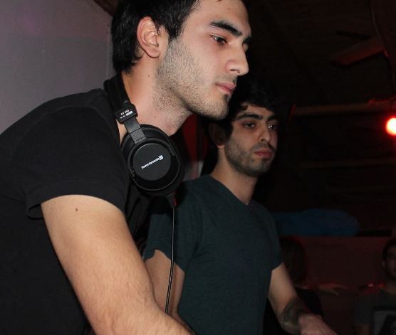 Faul & Wad Ad bei ihrem Auftritt am 3. Januar im Kn4st in Landshut (Niederbayern).